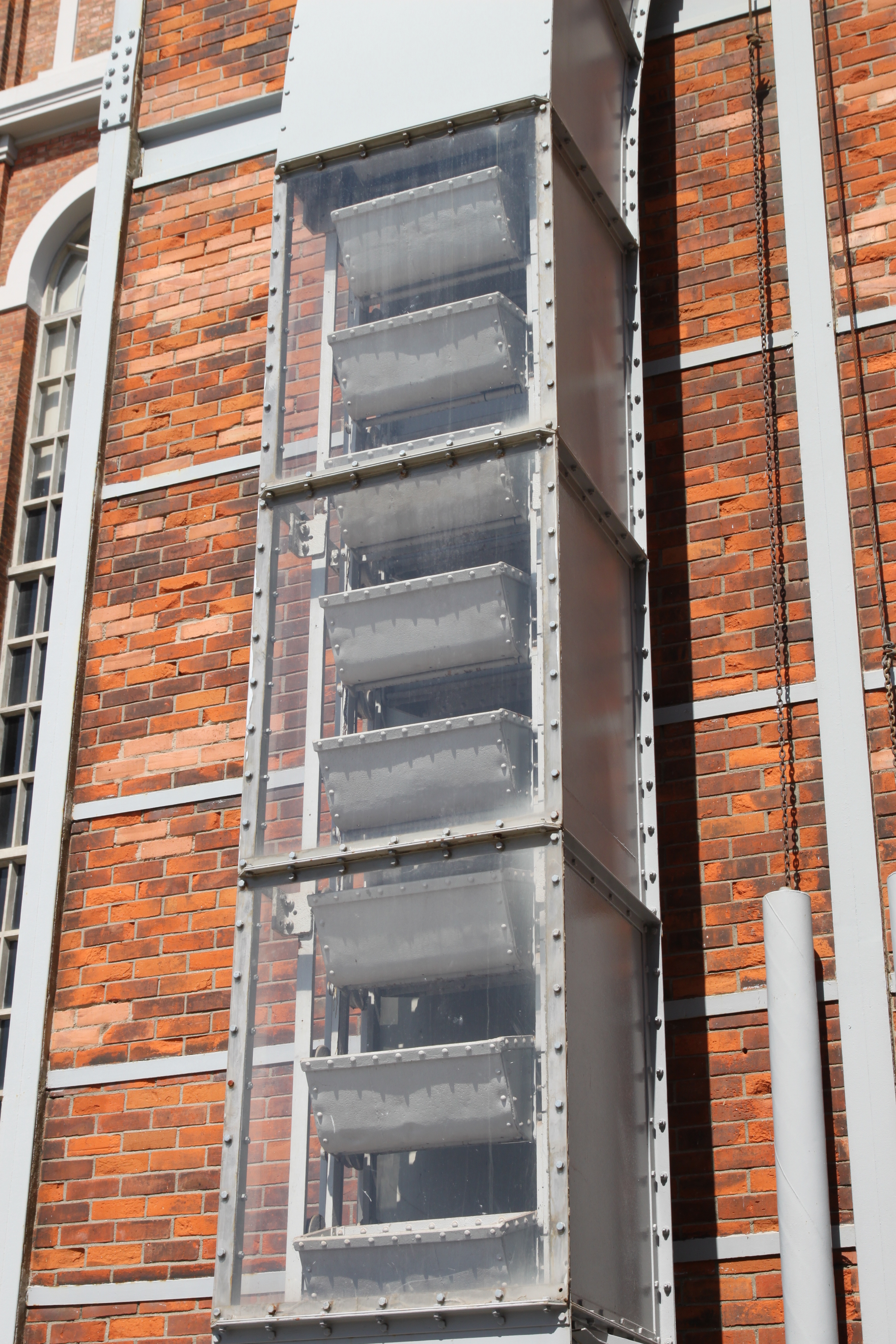 Central Tejo This file was uploaded for Wiki Loves Monuments in Portugal with the unique identifier 73123.